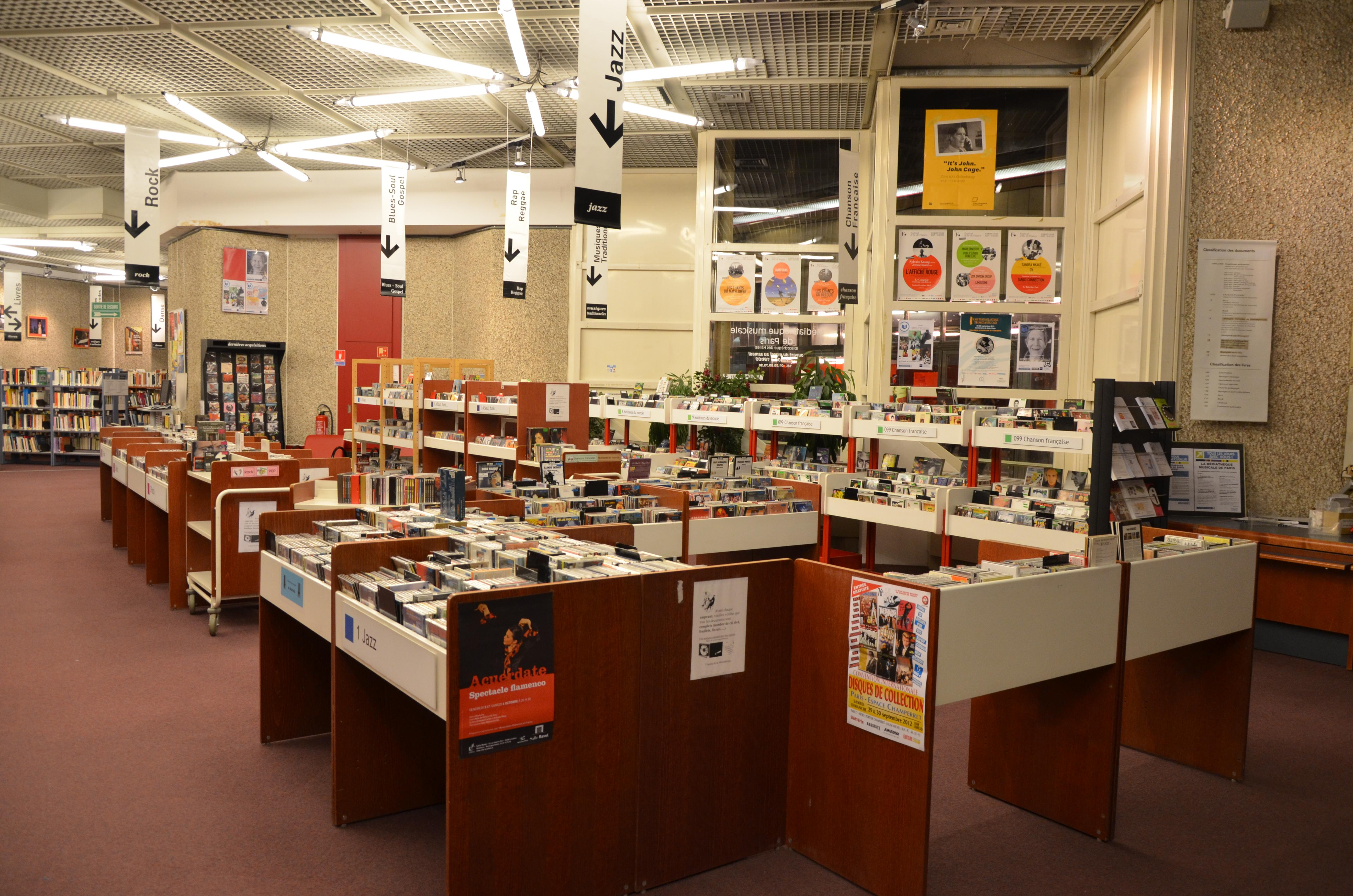 Salle de prêt de la Médiathèque musicale de Paris - vue générale